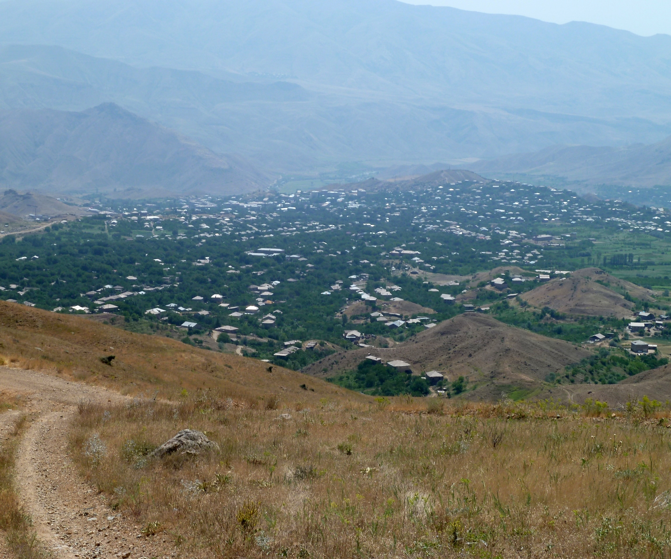 Ехегнадзор с высоты